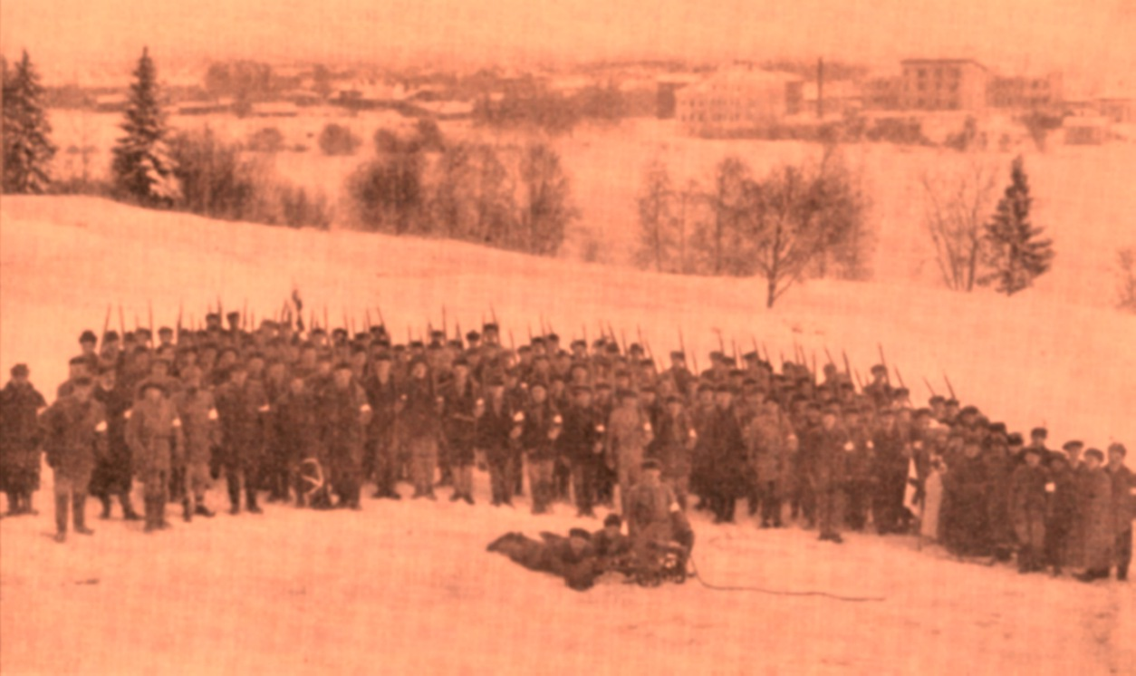 Description